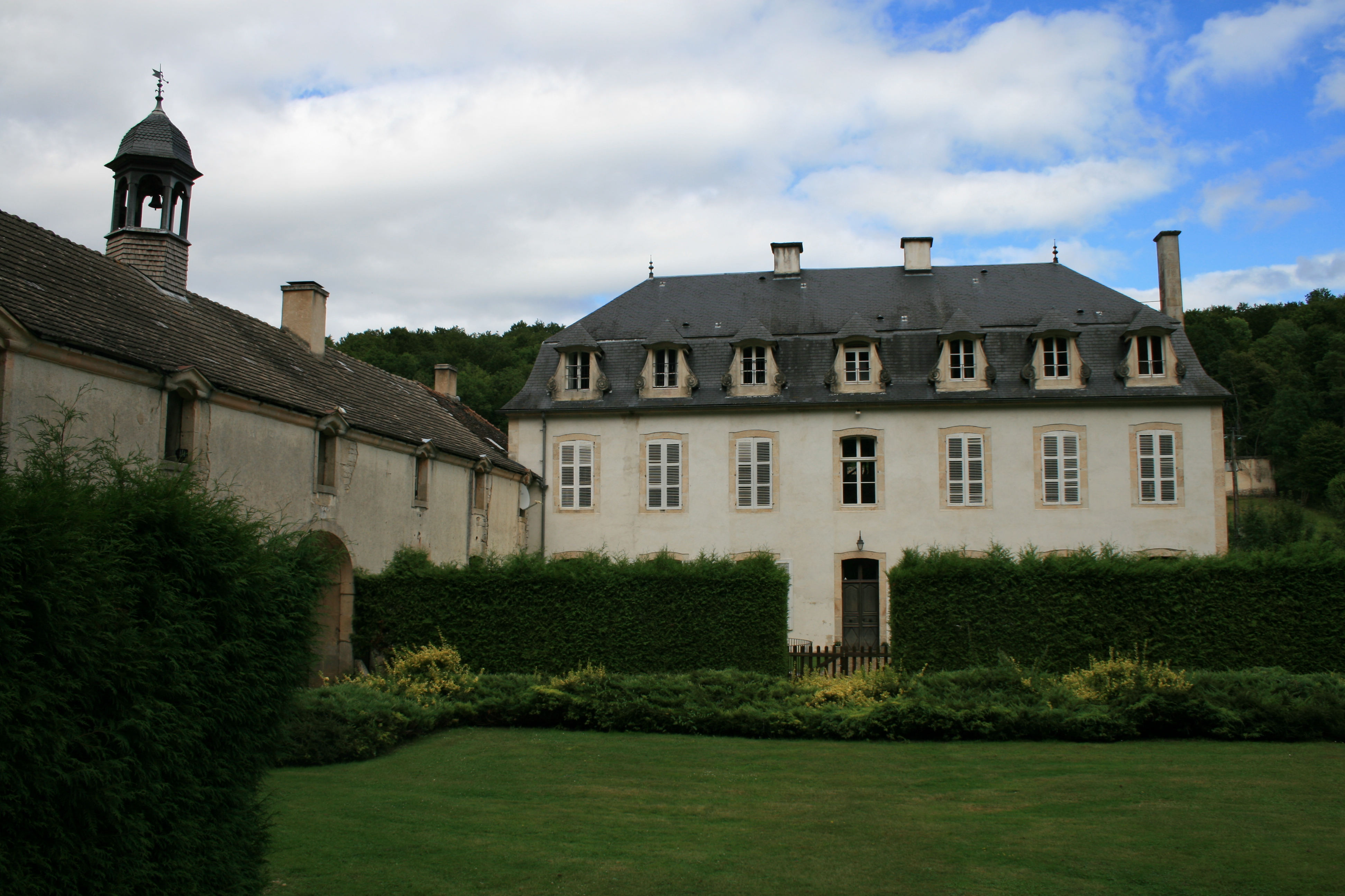 Abbaye du Val des Choues vue de l'hôtel du Duc de Penthièvres